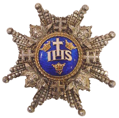 Królewski Order Serafinów